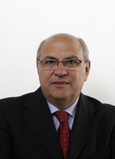 Politico italiano